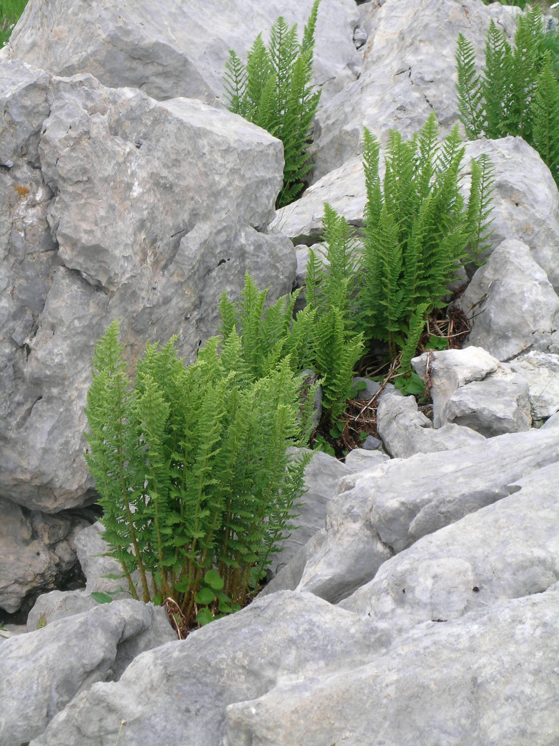 Dryopteris villarii Scht. et Th., Schynige Platte, Kanton Bern, Schweiz